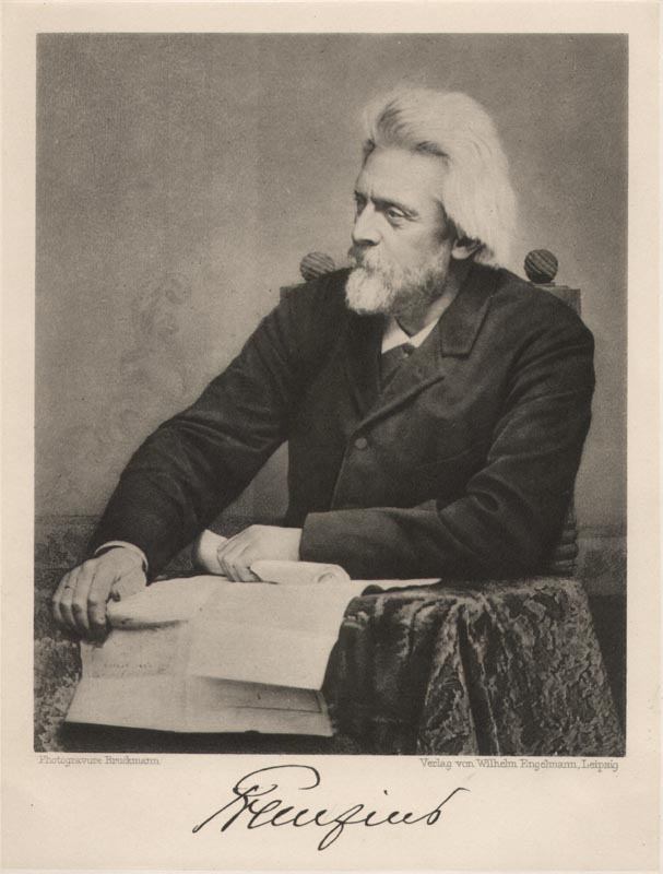 Franzius, Ludwig1832-1903, Porträt